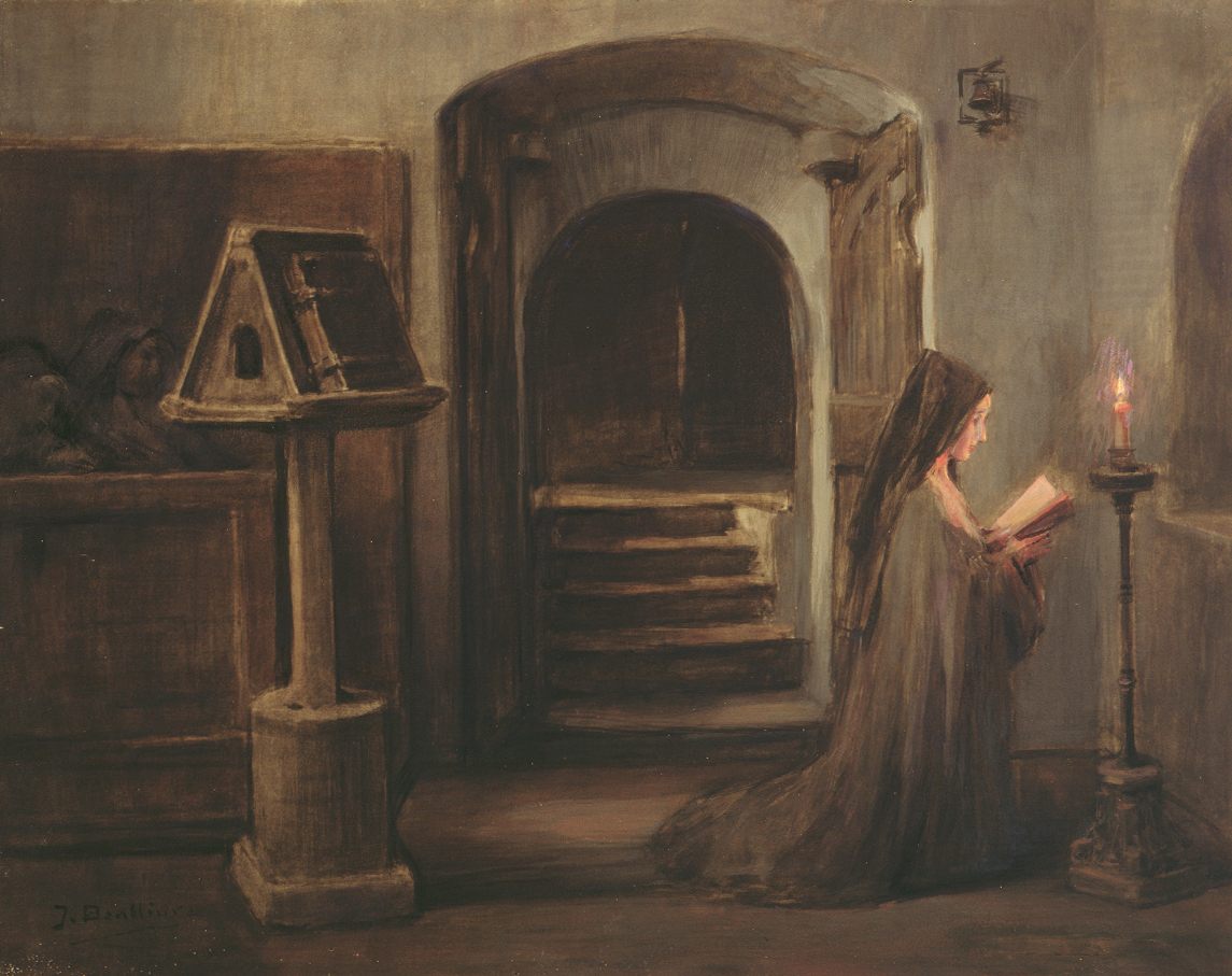 Clara orando en el coro de San Damián.